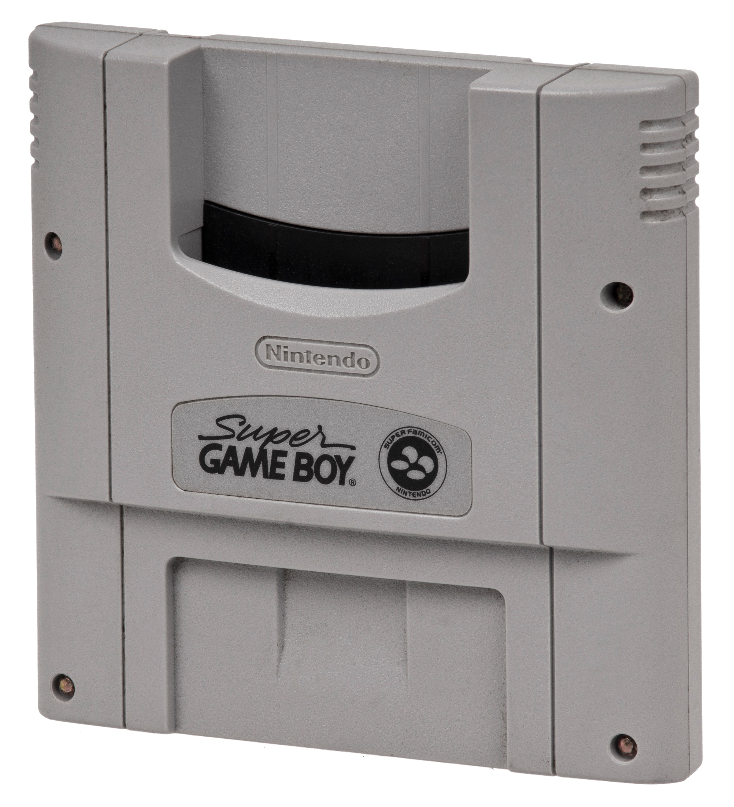 Derivative work from File:Super-Game-Boy-JP.jpg